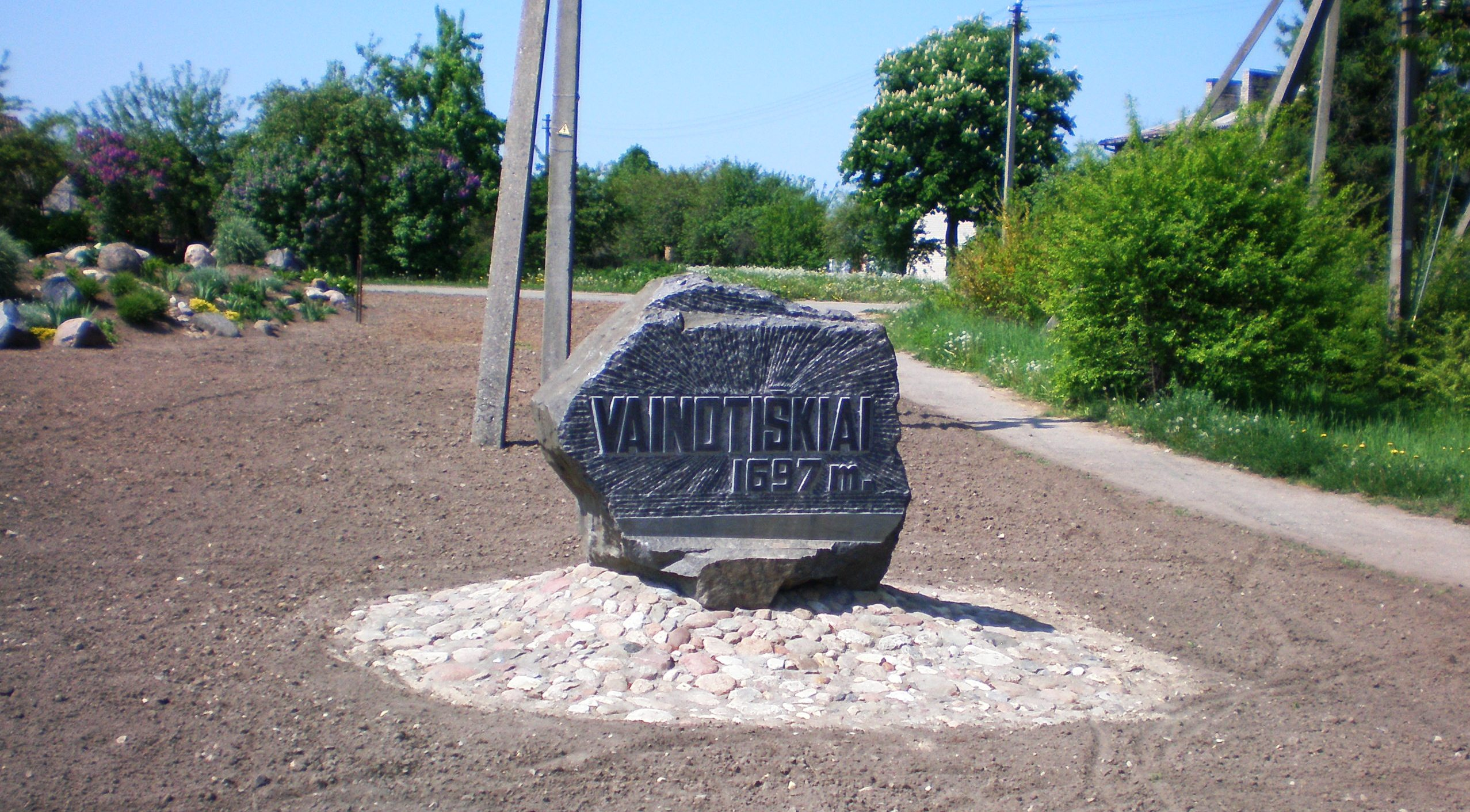 Vainotiškiai, Kėdainių raj.